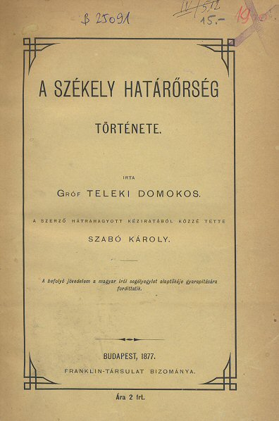 Teleki Domokos (1810–1876): A székely határőrség története című művének címlapja. Budapest, 1877